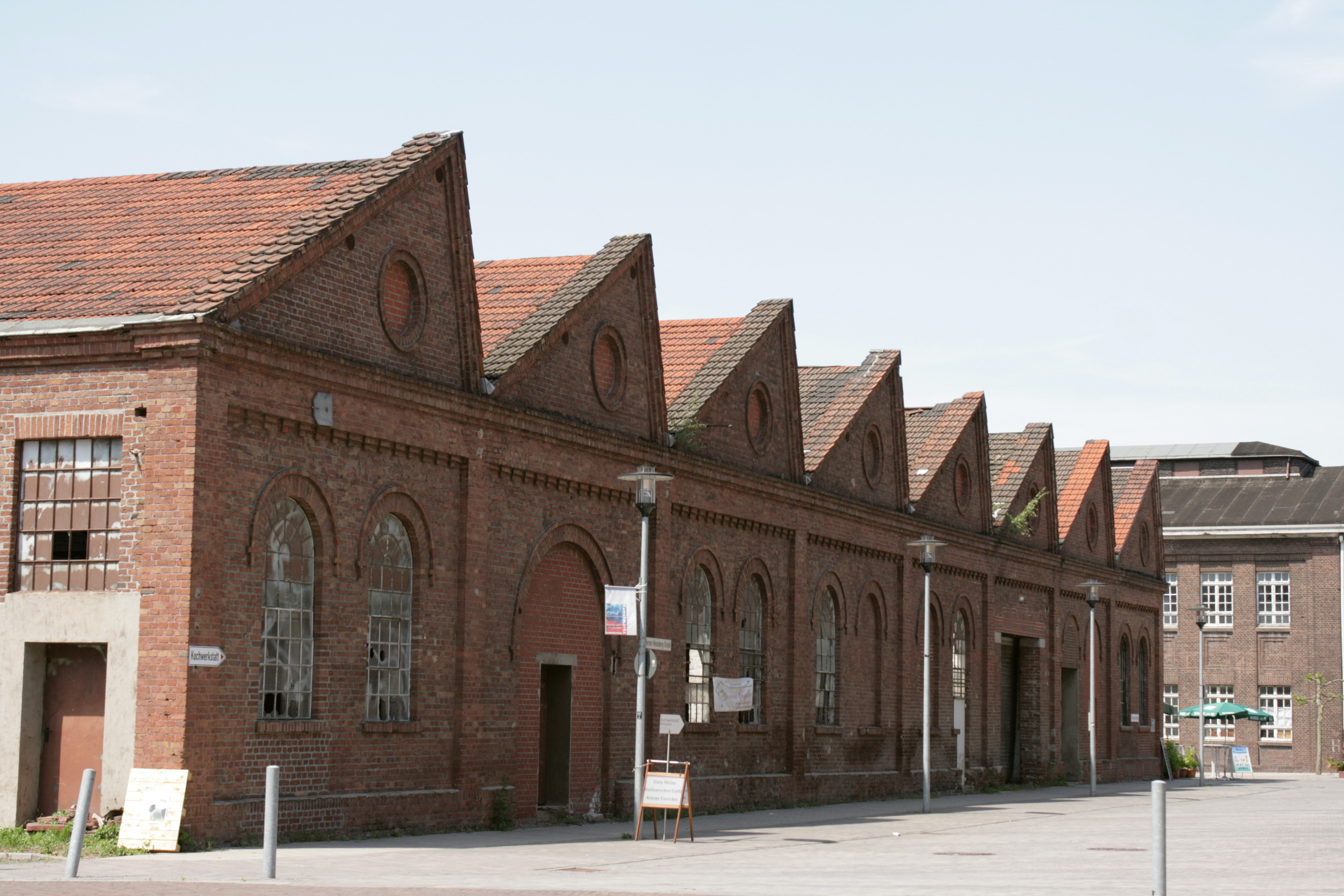 Zeche Ewald in Herten